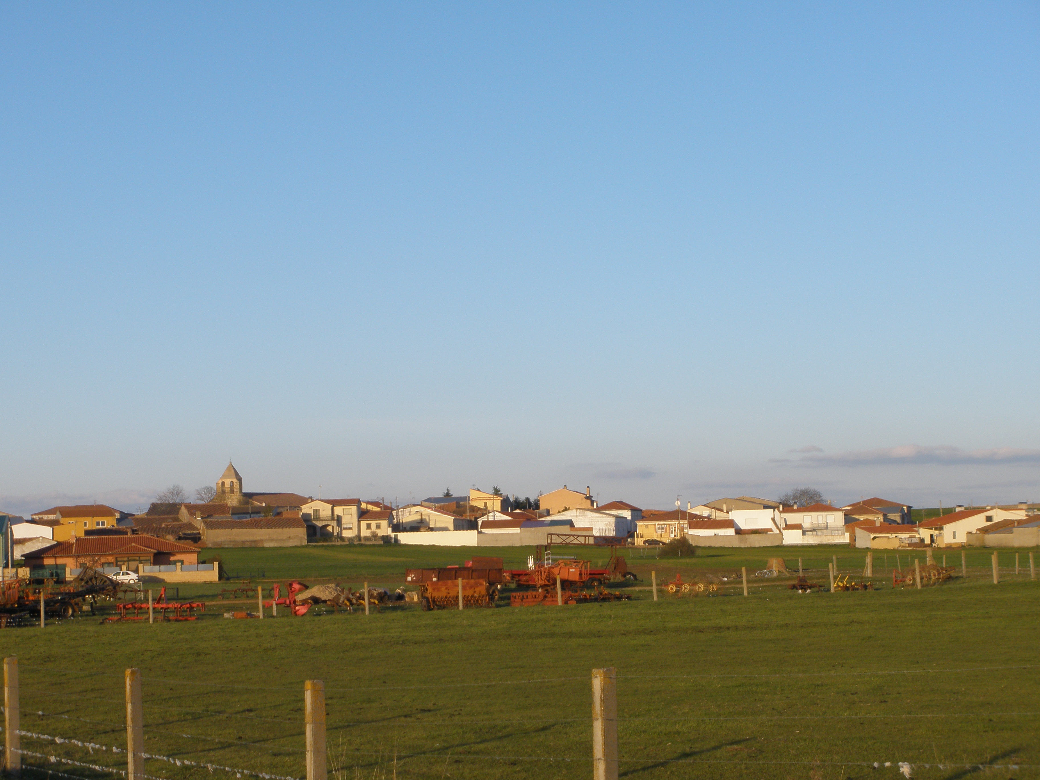 Estas son las vistas del pueblo desde unos caminos agrícolas.